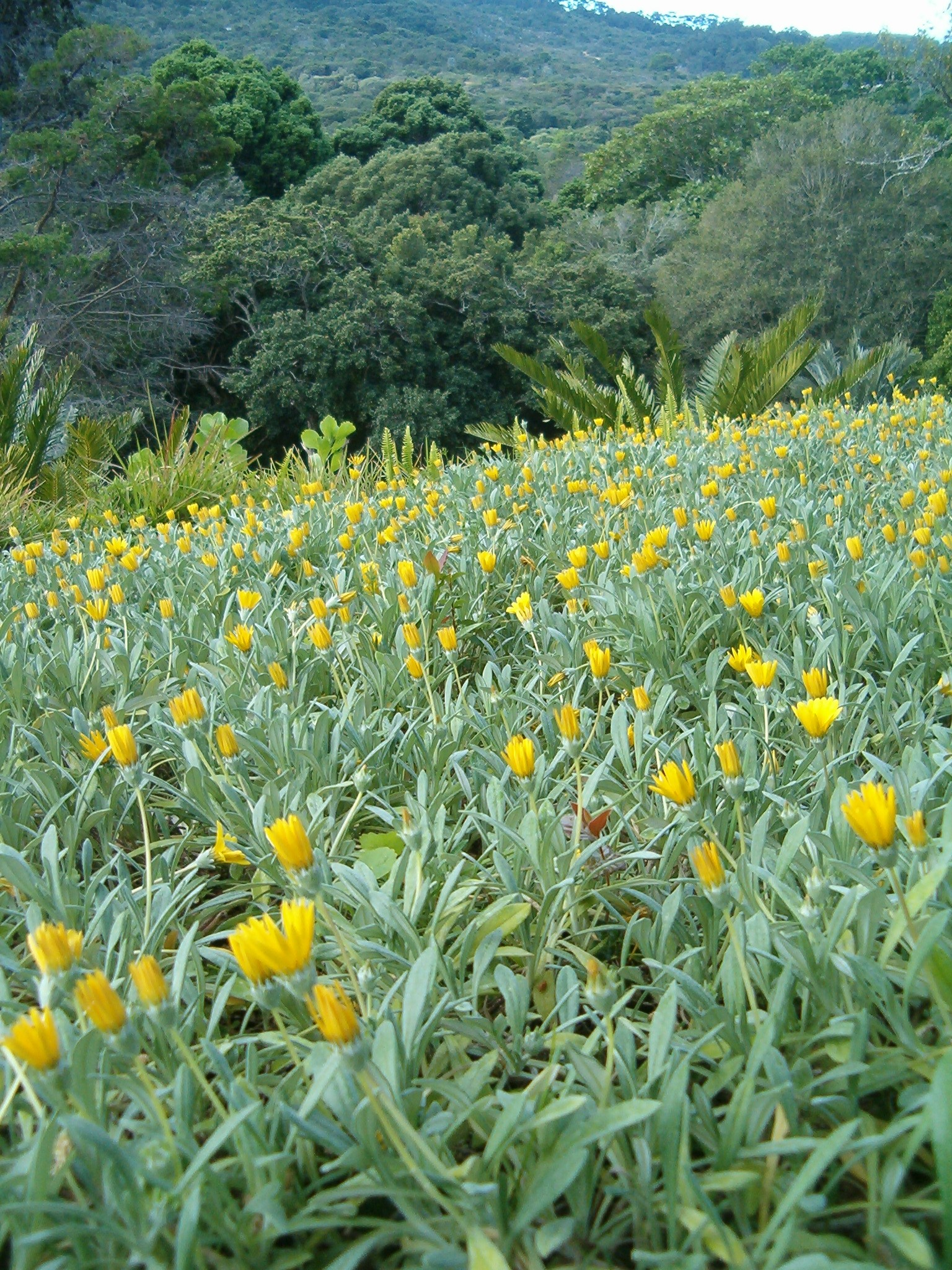 At Kirstenbosch National Botanical Gardens Name Gazania rigens var. uniflora